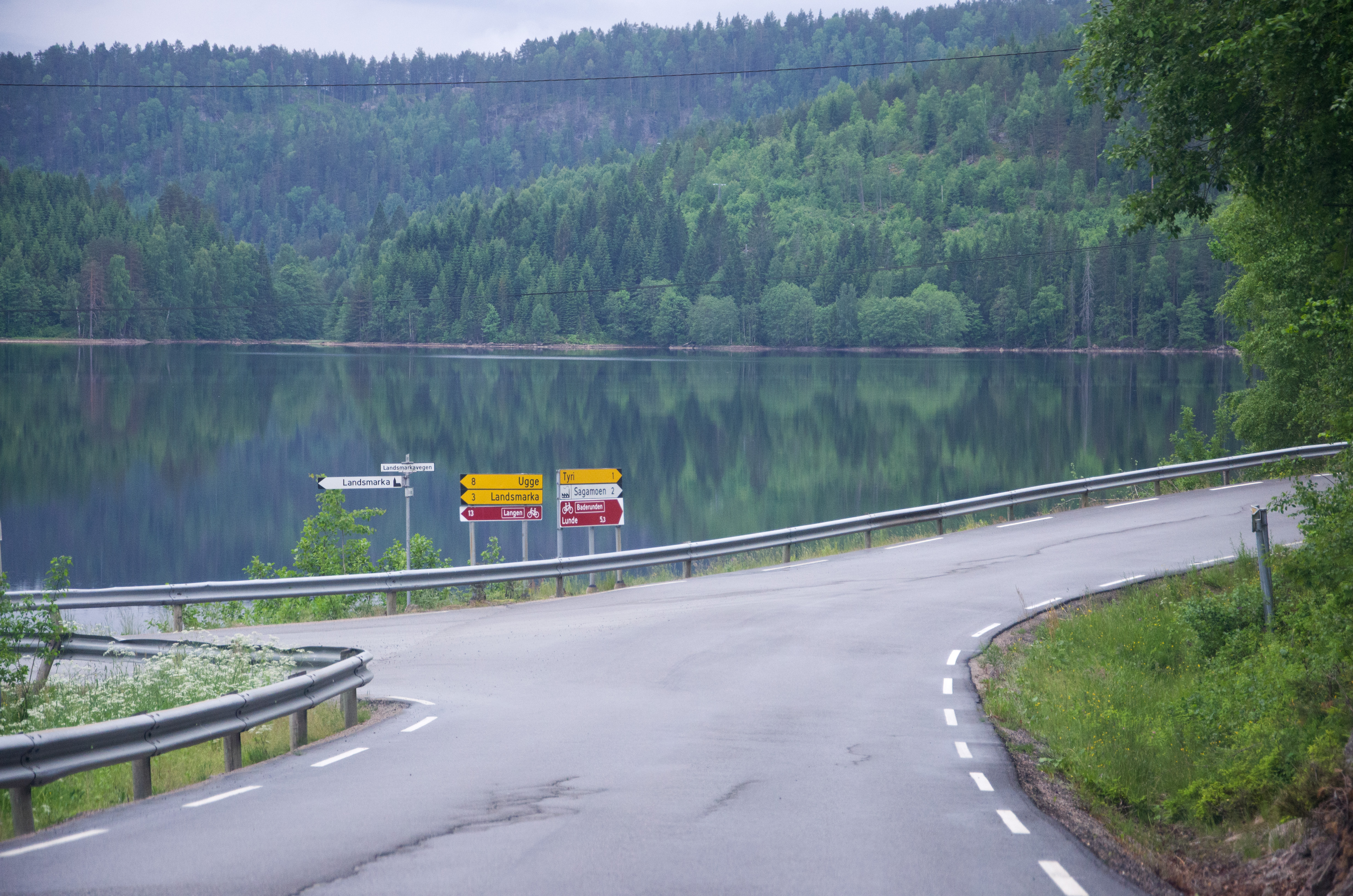 Fylkesvei 110 i Lunde, Telemark. Krysset mellom Tyrivegen/Skårdalsvegen og Landsmarkavegen. Tyrivatn i bakgrunnen.